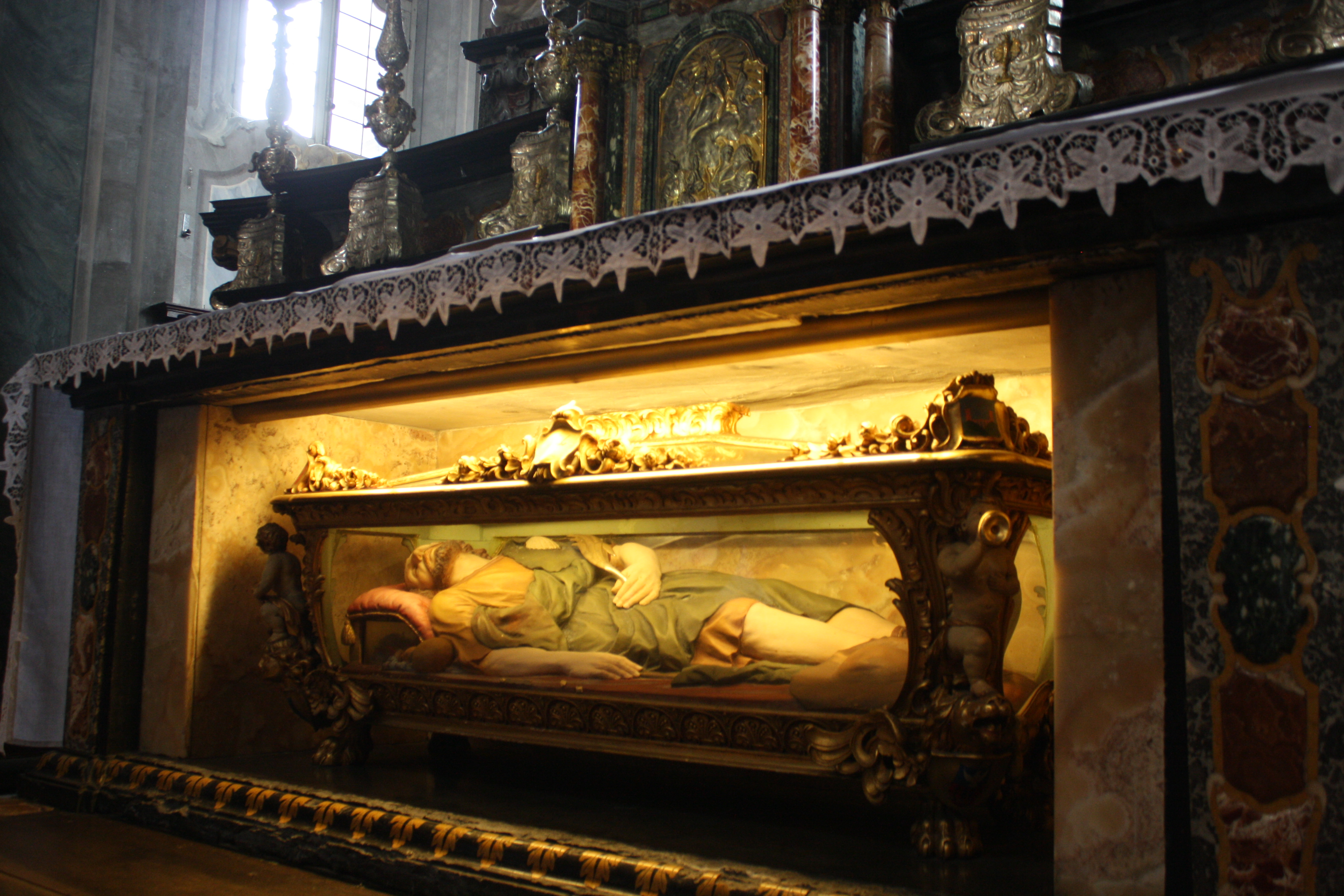 Basilica di San Giovanni Battista, reliquie di San Sabino sotto l'altare maggiore. This is a photo of a monument which is part of cultural heritage of Italy.